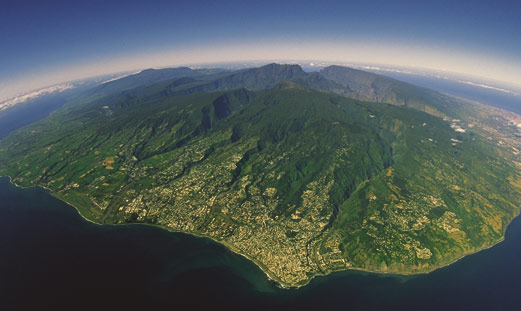 De Saint Denis à Sainte Suzanne en passant par Sainte Marie le Beau Pays s'étend sur la totalité du Nord de la Réunion